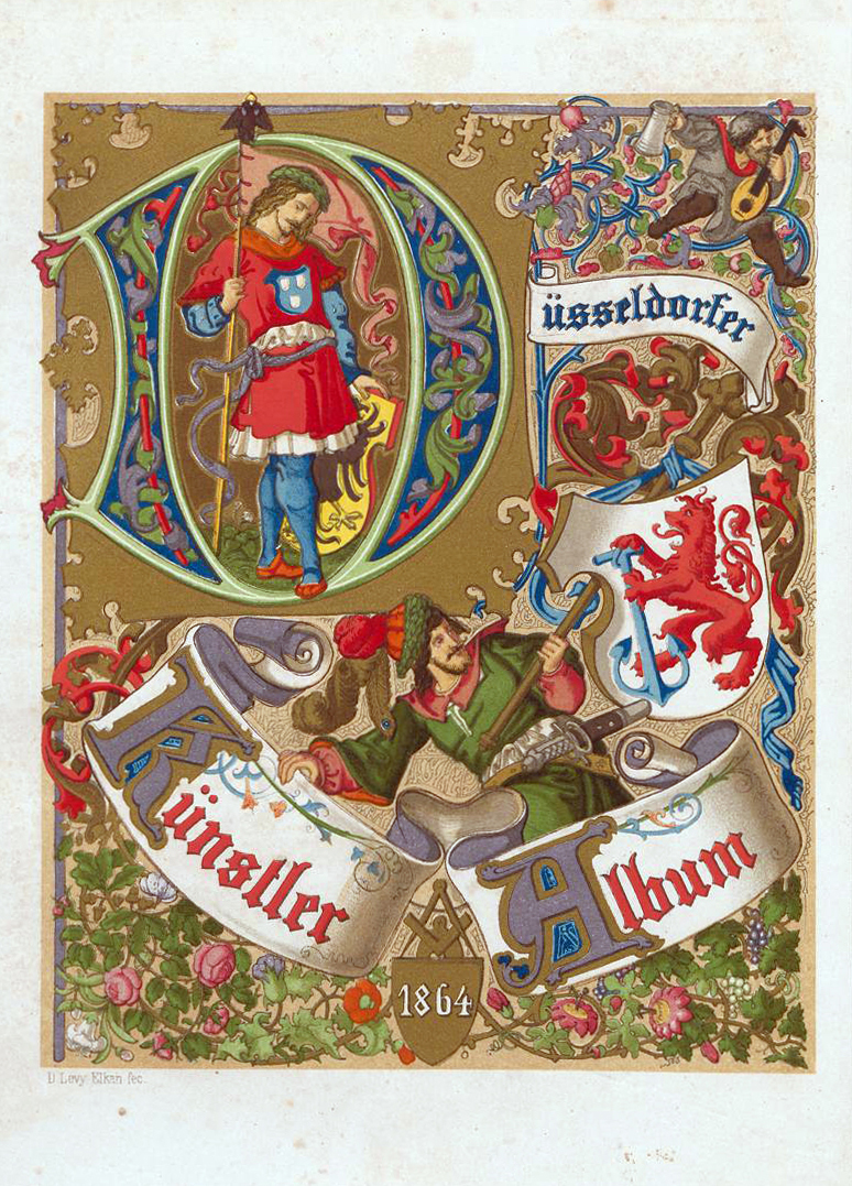 Düsseldorfer Künstler-Album, 14. Jg. 1864, Kupfertitel David Levy Elkan